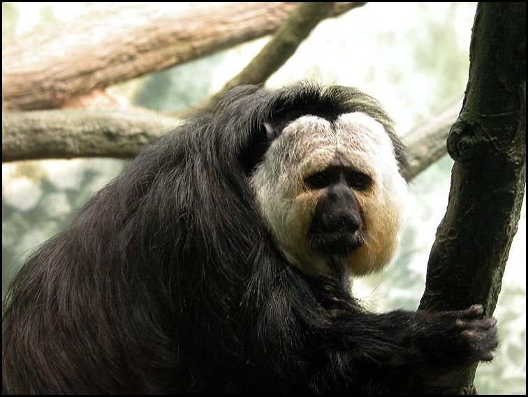 Weißkopfsaki (Pithecia pithecia), Selbst fotografiert im Zoo Frankfurt.